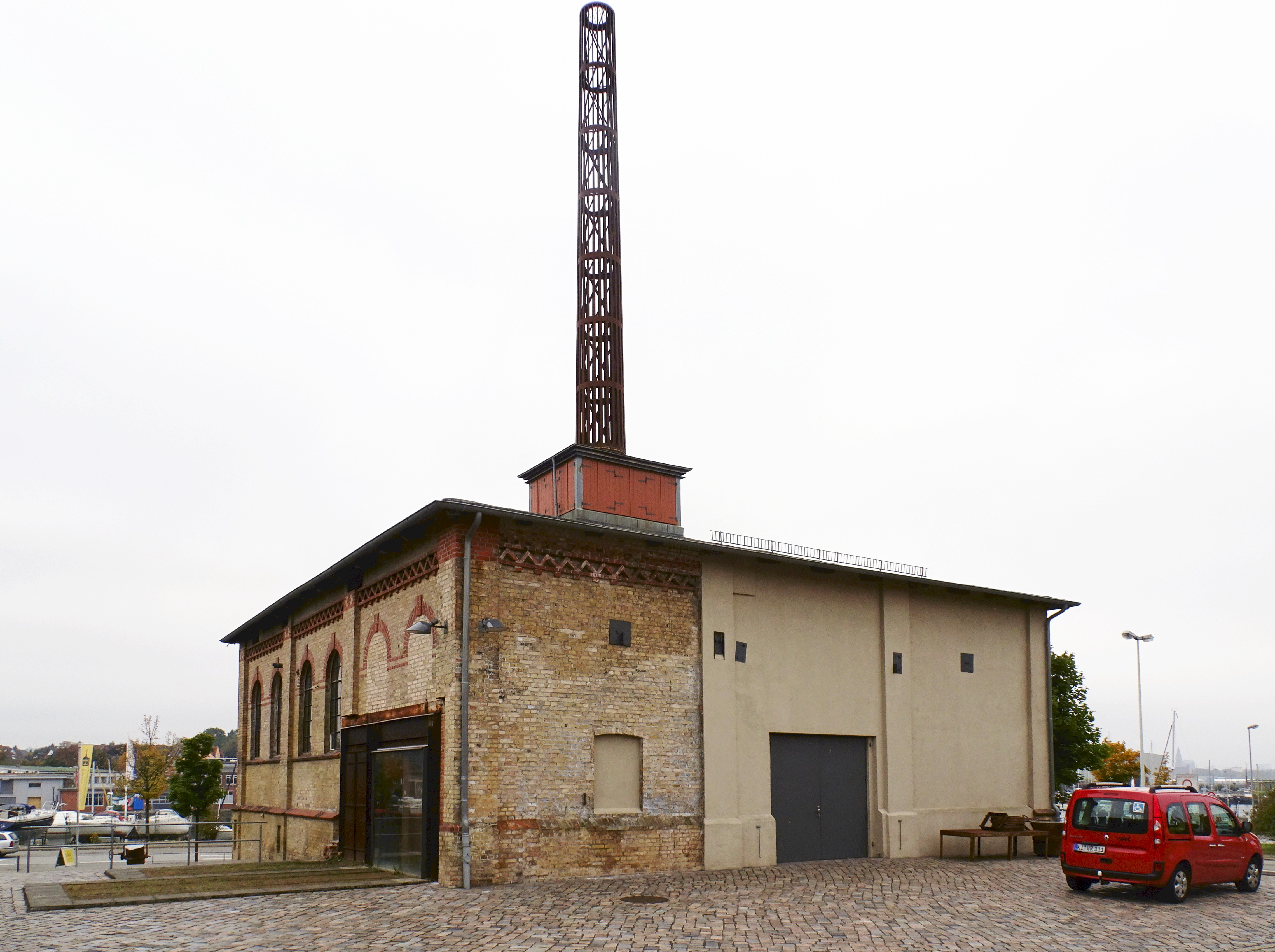 Alte Metallgiesserei Kiel, Exterieur